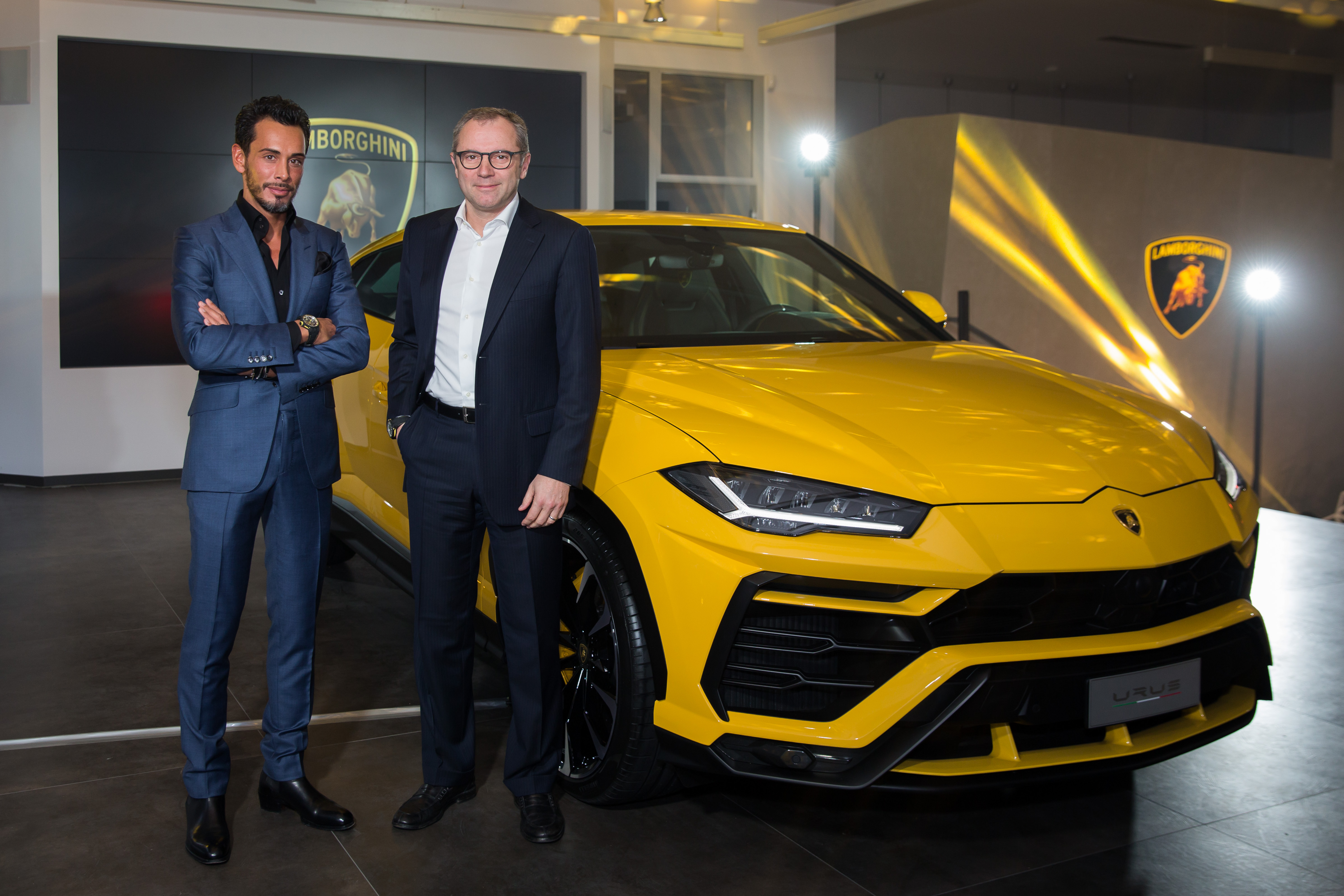 E. Schumacher et S. Dominicali lors du lancement de L'Urus Lamborghini à Paris